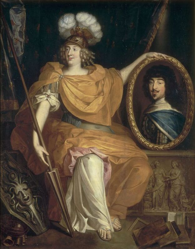 Anne-Marie-Louise d'Orléans, duchesse de Montpensier Pierre BOURGUIGNON (1630 - 1698)